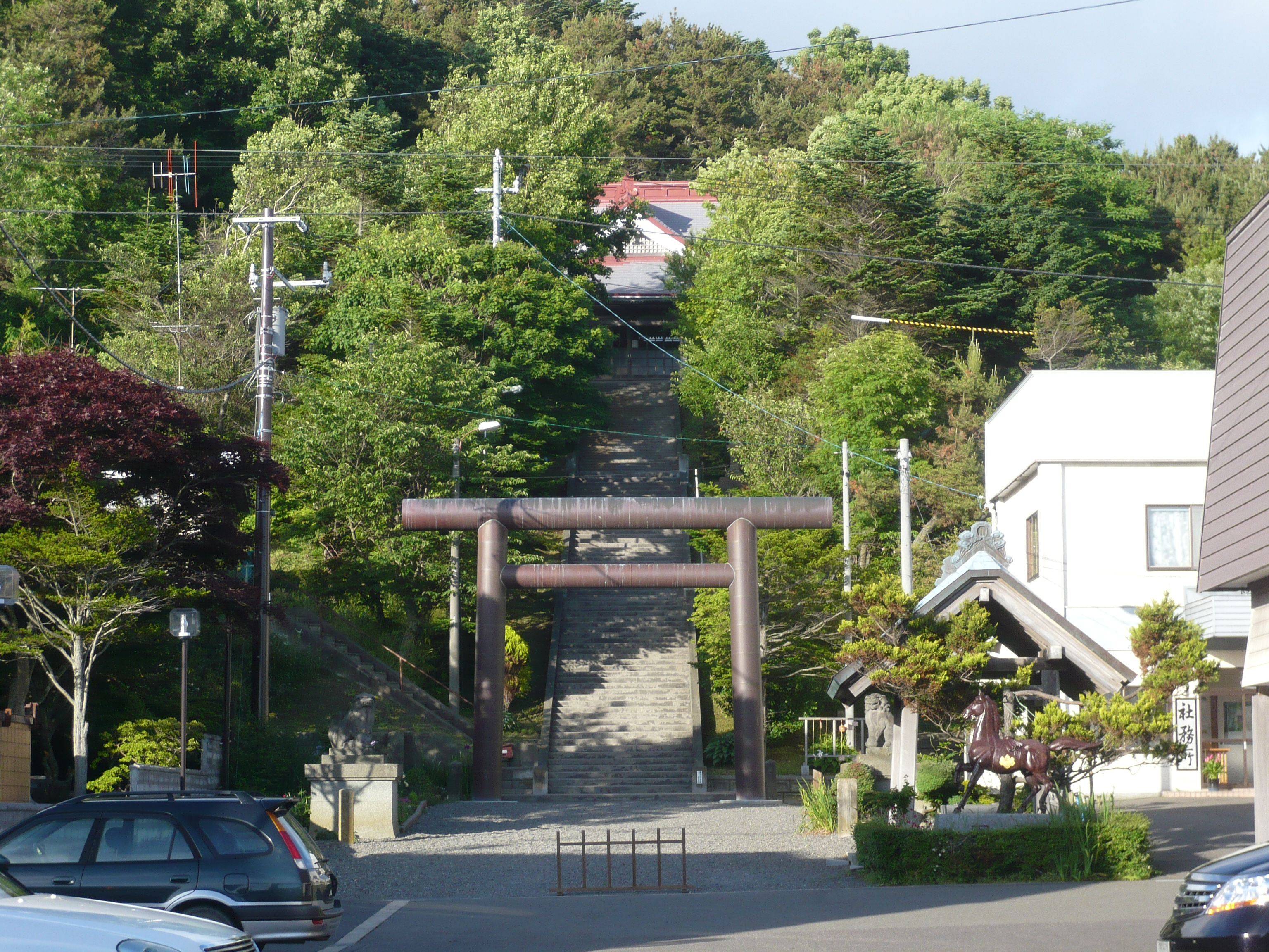 浦河神社。北海道浦河町